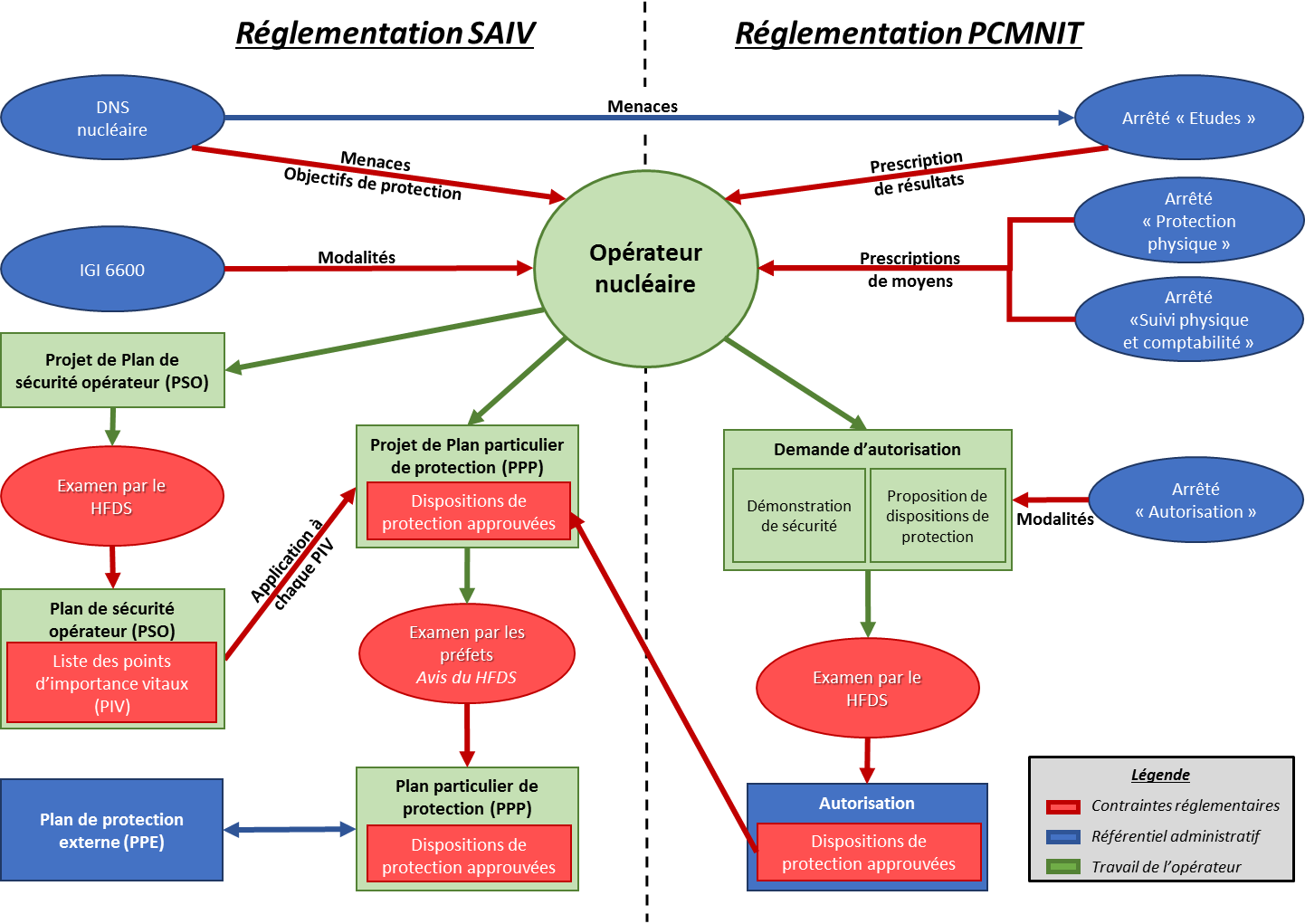 Présentation de l'architecture des réglementations relatives aux secteurs et activités d'importance vitale (SAIV) et à la protection et au contrôle des matières nucléaires, de leurs installations et de leurs transports (PCMNIT)